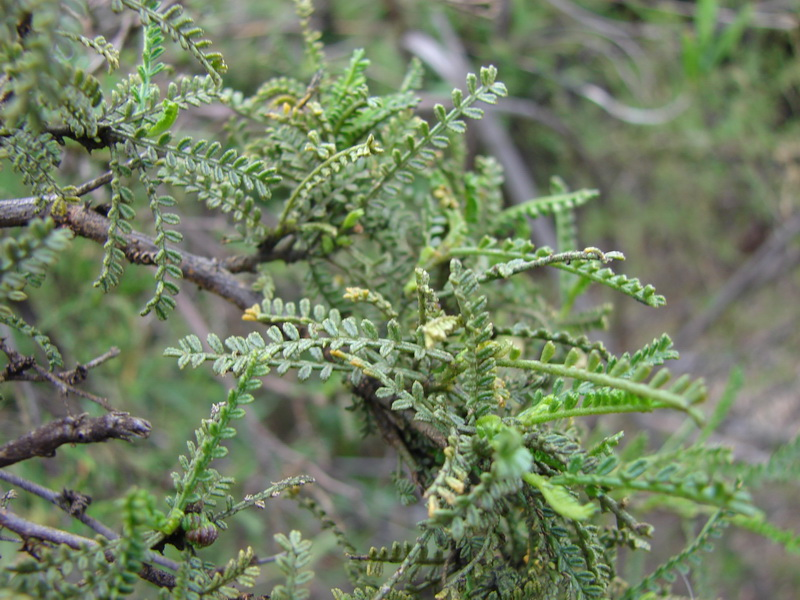 Santuario de la Naturaleza Palmar El salto. Quebrada Rodelillo